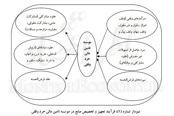 انواع تامین مالی خرد توصیف شده است